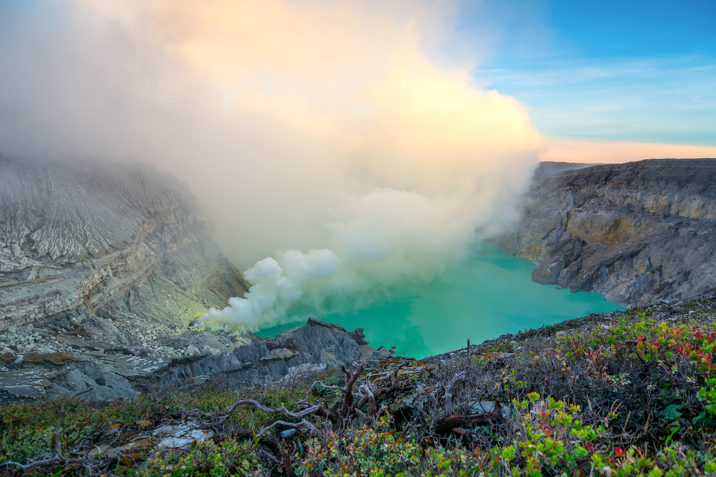 Suasana Kawah ijen di waktu pagi hari yang terletak di dua kabupaten di jawa timur yaitu kabupaten Banyuwangi dan kabupaten Bondowoso